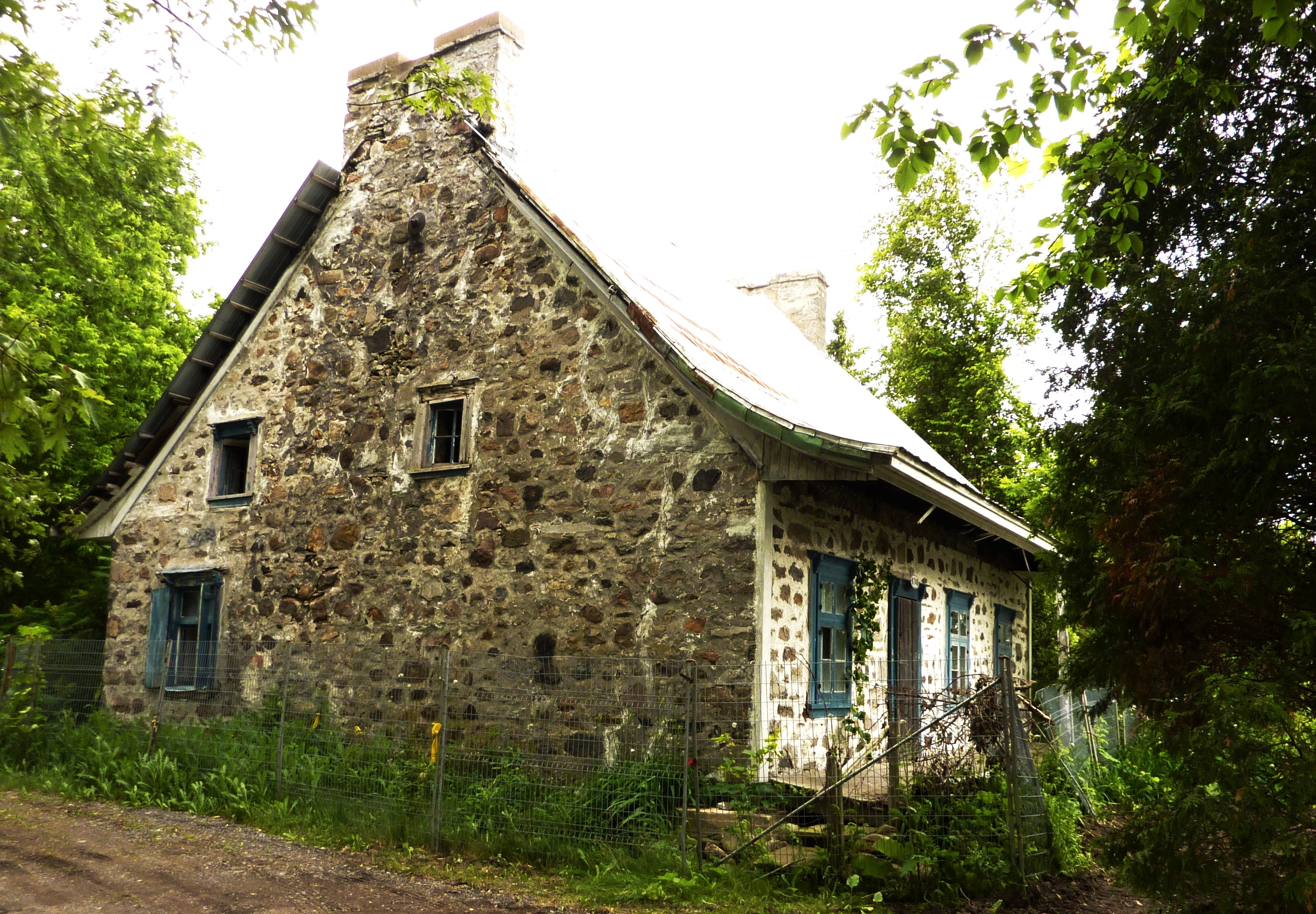 Maison Pierre-Thibault. Construction: 1736. Vers la fin des années 1980, cette maison était monument historique classée. En 1972, un jeune couple se portait acquéreurs de cette magnifique construction, témoin du XVIIIè siècle rural. Près de 40 ans plus tard elle semble abandonnée et menace ruine. Quelle triste histoire se cache derrière ces murs de pierre? Comparatif vers 1985